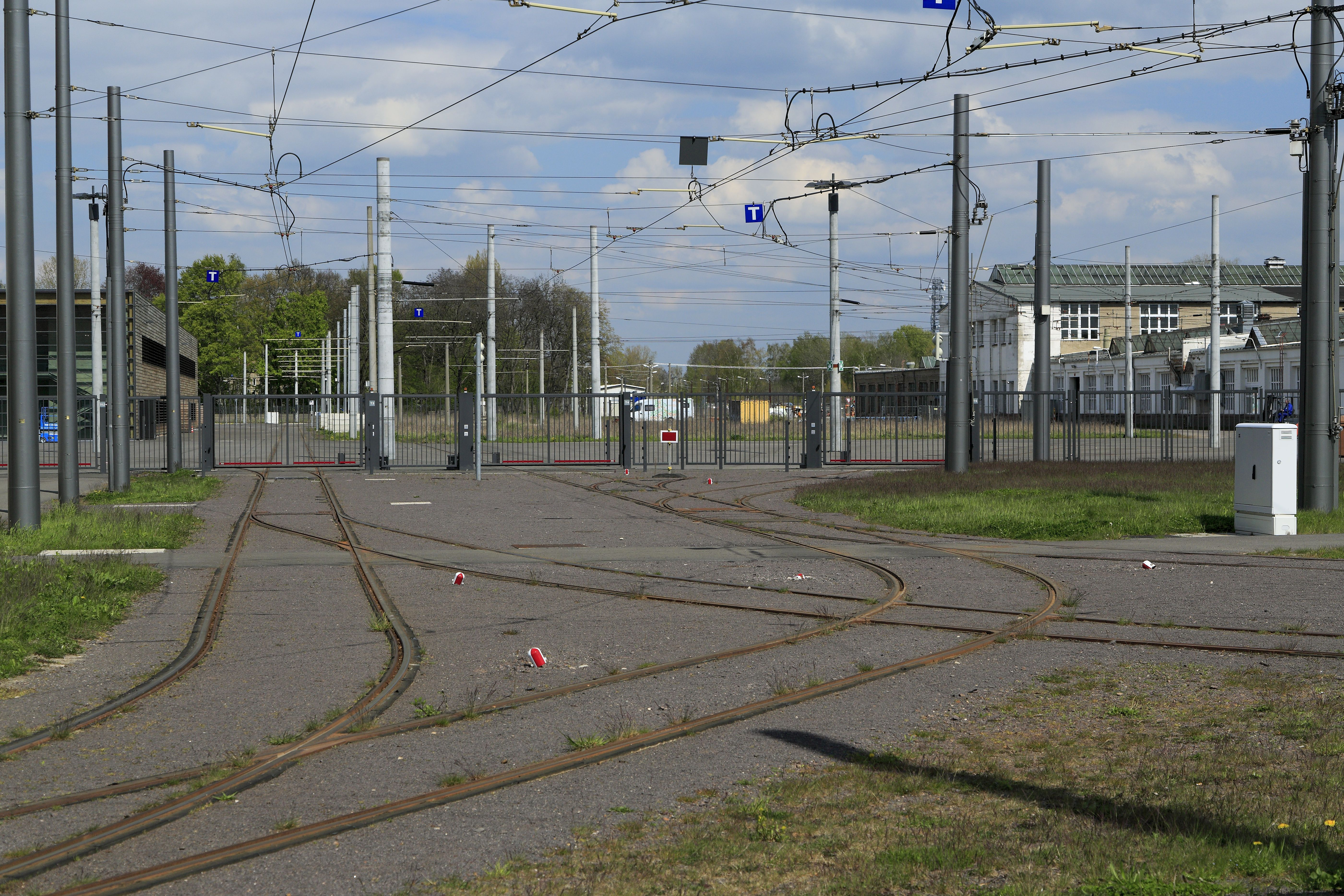 An dieser Stelle gab es früher wegen des nicht bestehenden Ausziehgleises in der Teslastraße links vom Kamerastandpunkt nur zwei von rechts einmündende Gleise ohne Weichen.